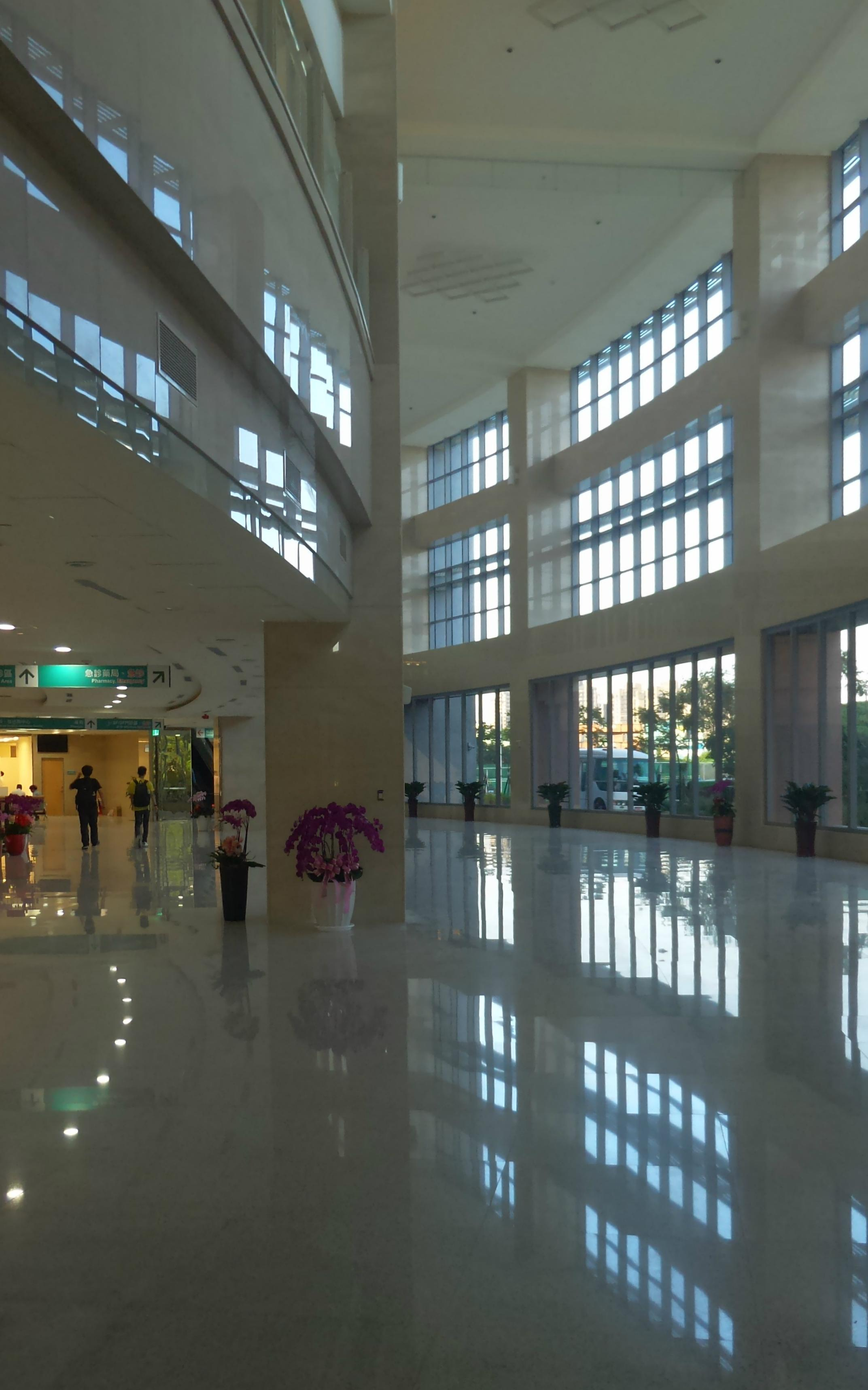 輔大醫院大廳，窗外有接駁車。